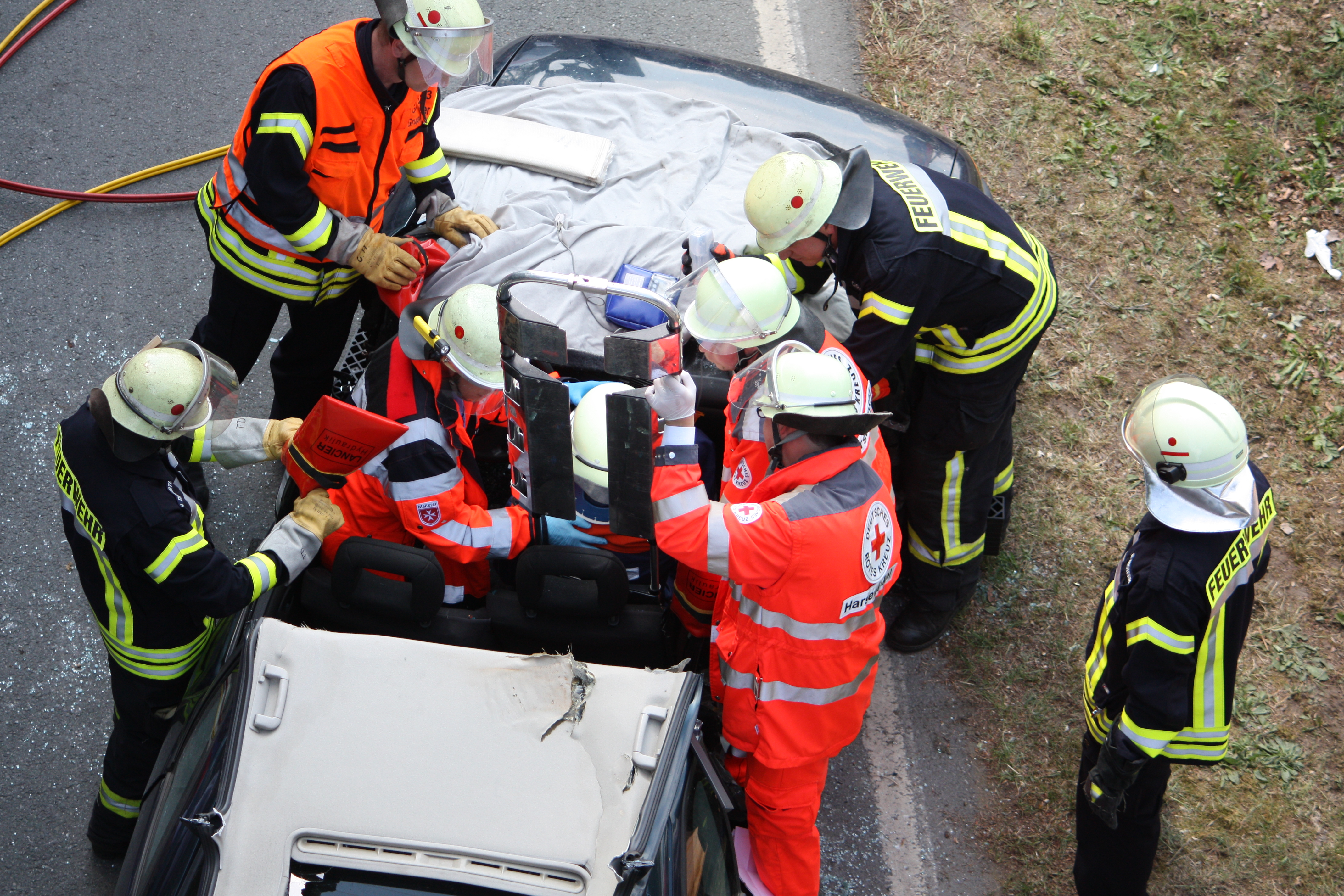 Patientengerechte Rettung bei einer Übung der Freiwilligen Feuerwehr Marienfeld änlässlich des 100jährigen Bestehens